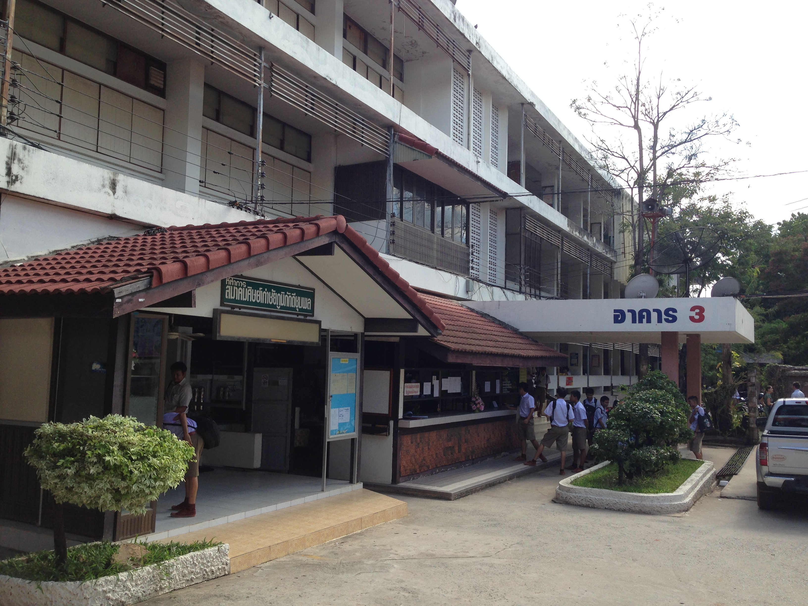 อาคาร 3 เป็นอาคารที่ใช้งานเฉพาะชั้น 1 และ 2 โดยยกเลิกการป็นอาคารเรียนเมื่อปี พ.ศ. 2553 และปัจจุบันมีเฉพาะชั้นล่างเท่านั้นที่มีการใช้งานบ่อยครั้ง ชั้น 1 เป็นที่ทำงานของฝ่ายธุรการ ฝ่ายงบประมาณ ฝ่ายวิชาการ ห้องผู้บริหาร งานทะเบียน แนะแนว ชั้น 2 เป็นที่ตั้งของห้องโสตทัศนูปกรณ์ ชั้น 3 ปิดการใช้งาน